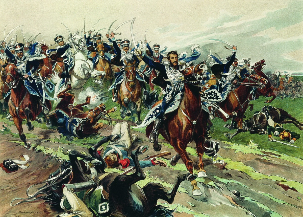 Николай Самокиш. Атака у Клястиц 20 июля 1812 года. Музей-панорама «Бородинская битва» (Москва)